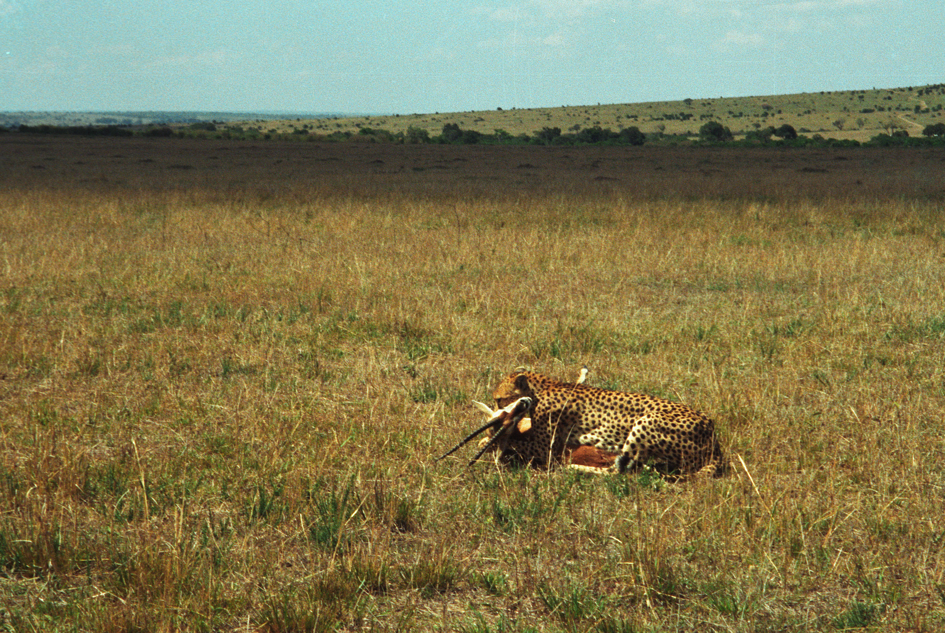 Cheetah, Masai Mara, Kenya